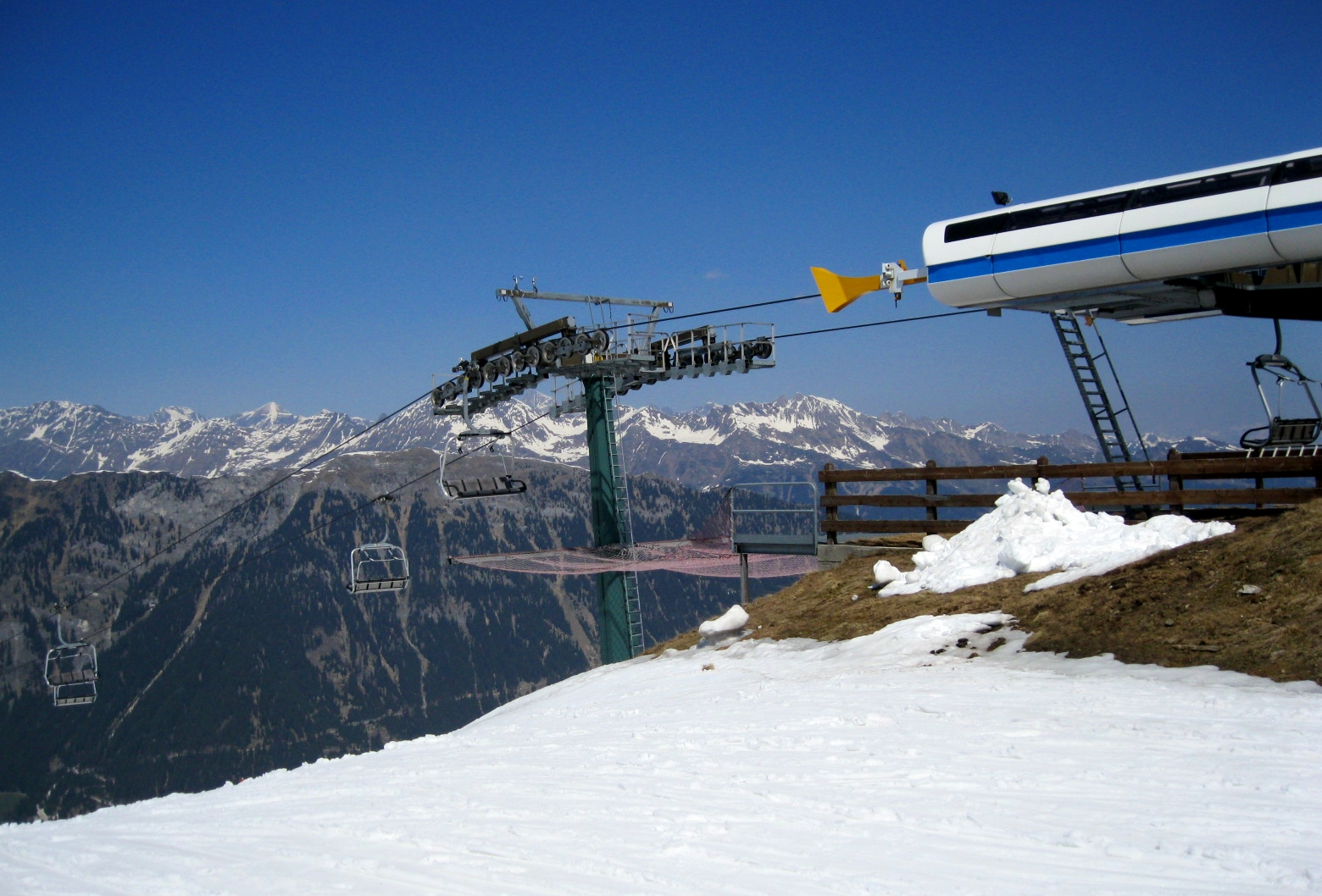 Bergstation des Sessellift "Rinneralm"